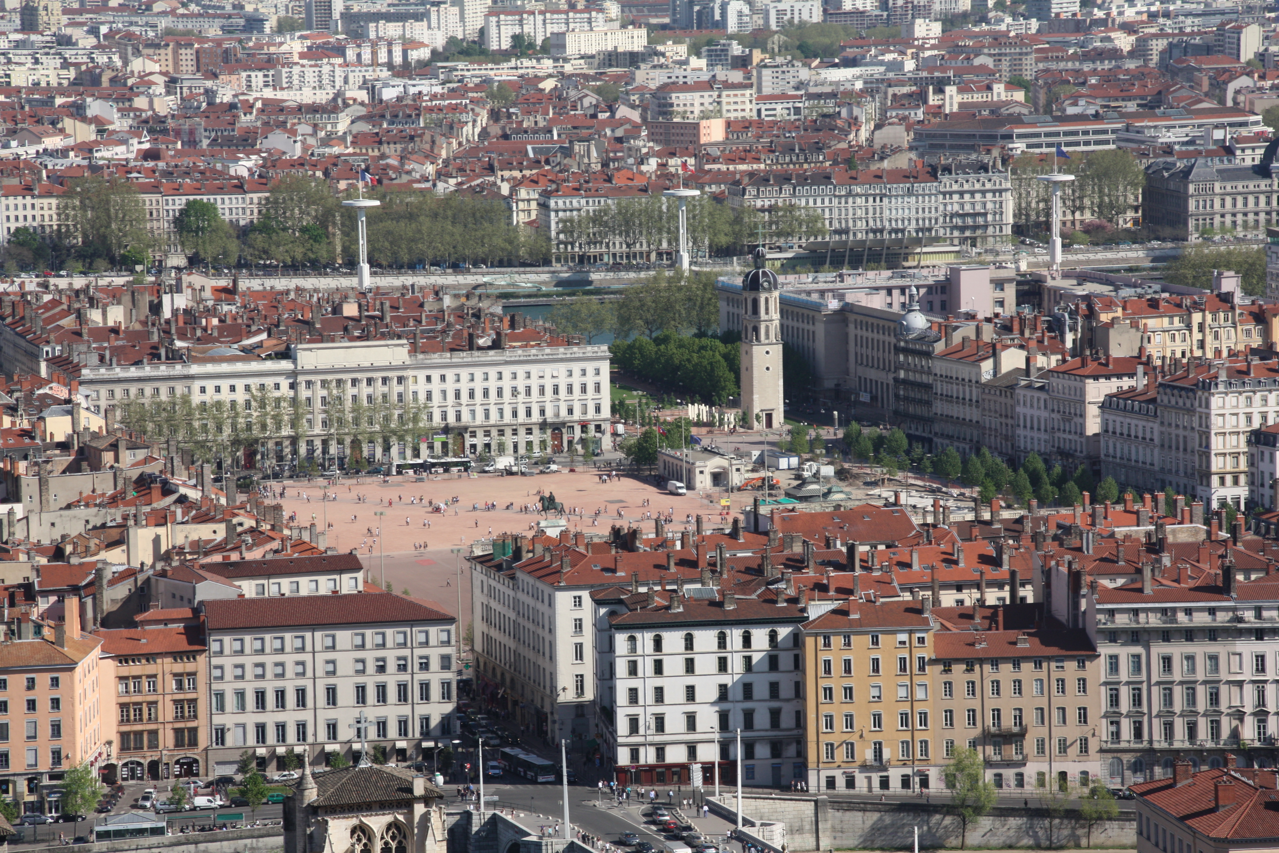 La Place Bellecour et la Place Antonin Poncet depuis l'esplanade de Fourvière à Lyon.